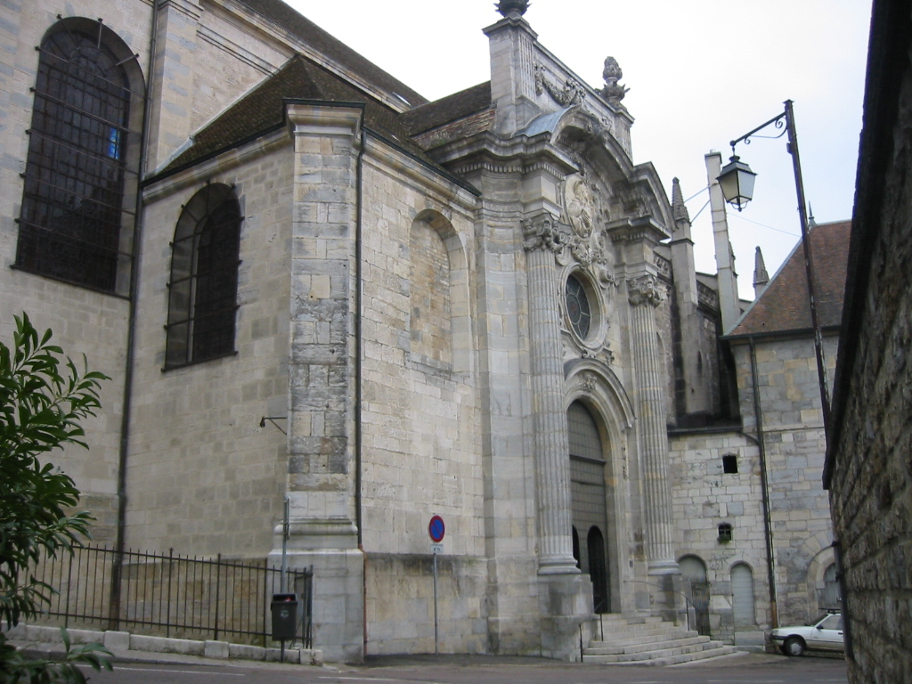 Cathedrale St Jean, témoignage d'un grand passé religieux de Besançon. Elle fut construite au XIIe siècle. Elle abrite aujourd'hui un énorme bourdon, qui ne sonne que très rarement, et une magnifique horloge astrnomique. Rue de la Convention